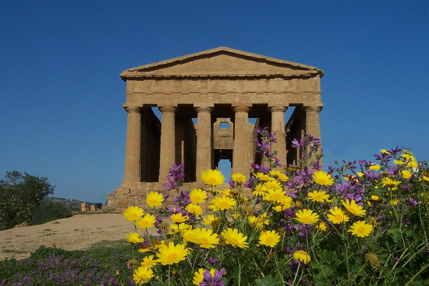 Eigen foto. mei 2003